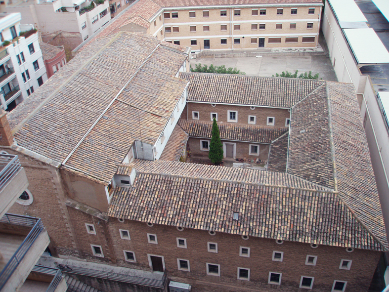 Patio y Claustro de la Iglesia y Convento de los Capuchinos (Tudela), en 2010